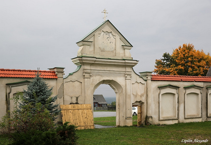 Юравіцкі кляштар езуітаў